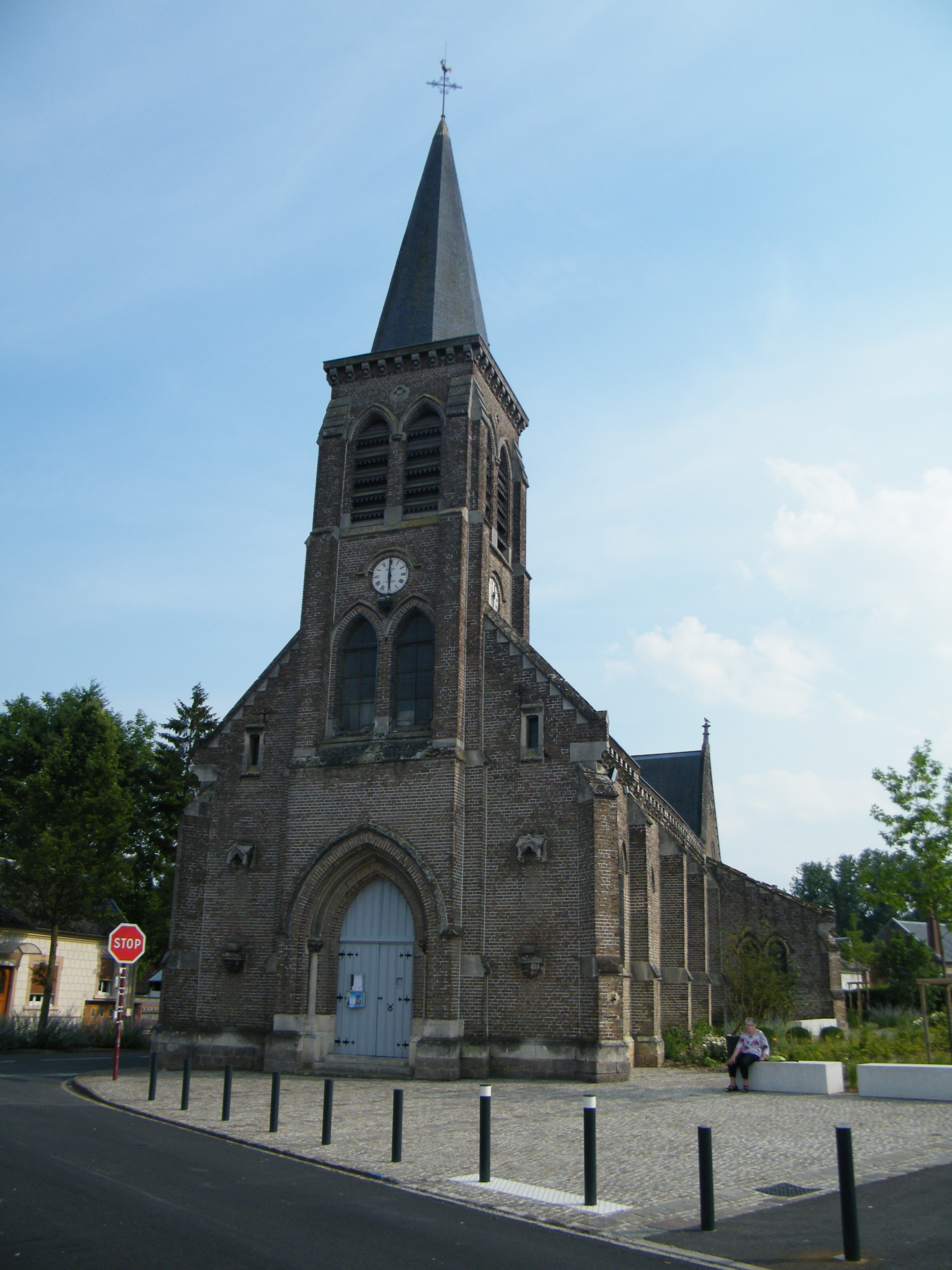 église.